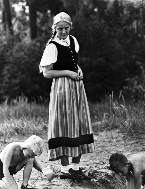 Mädchen mit spielenden Kindern Verschiedene Porträtaufnahmen von Charakterköpfen, gesammelt im Rassepolitischen Amt der NSDAP [Stehendes blondes Mädchen im Dirndl und spielende blonde Jungen] Information added by Wikimedia users.